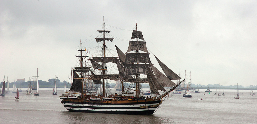 Amerigo Vespucci auf der Sail 2005 in Bremerhafen